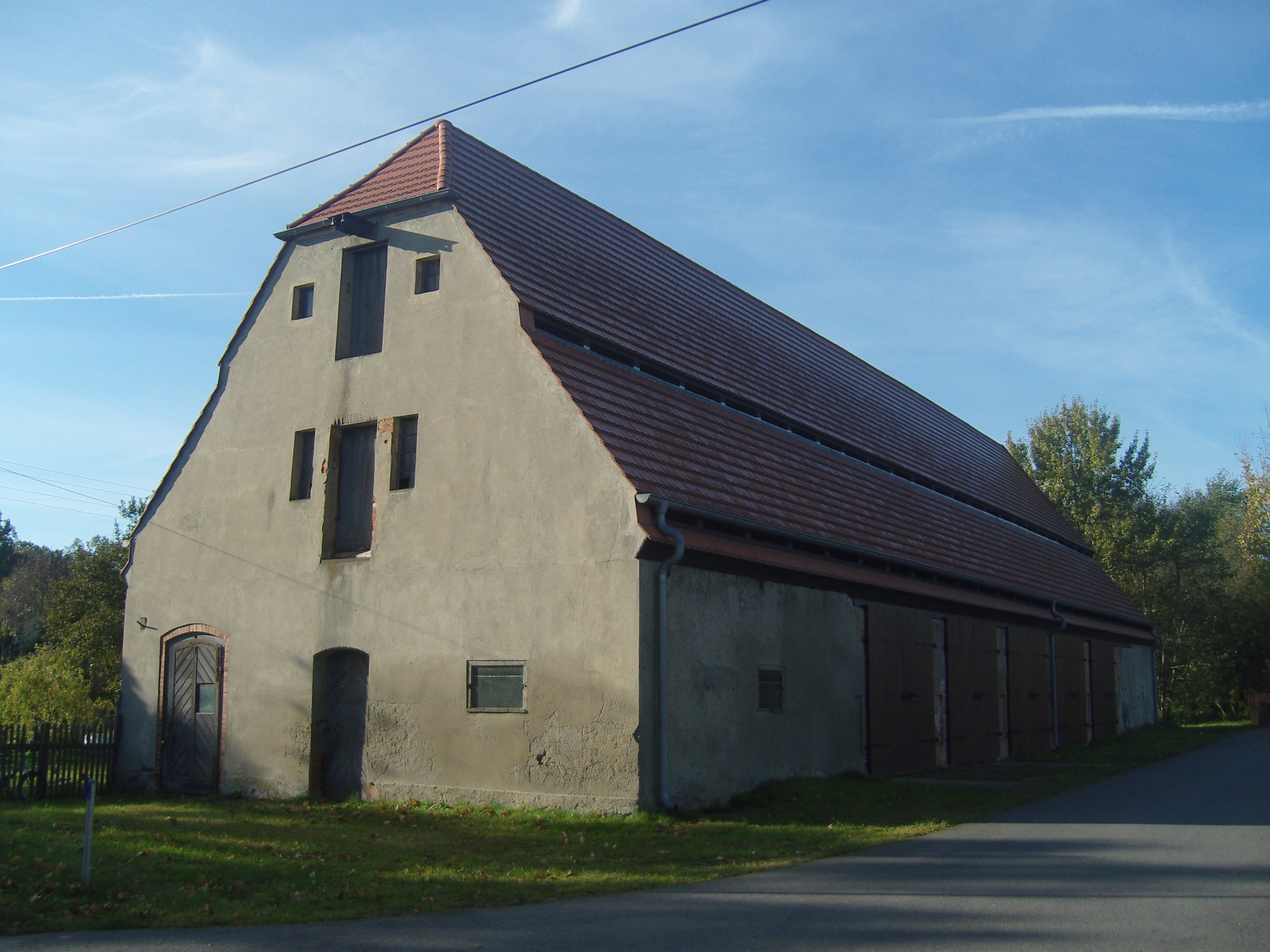 Speicher in der Lindenstraße in Neudöbern, Gemeinde Luckaitztal, Baudenkmal